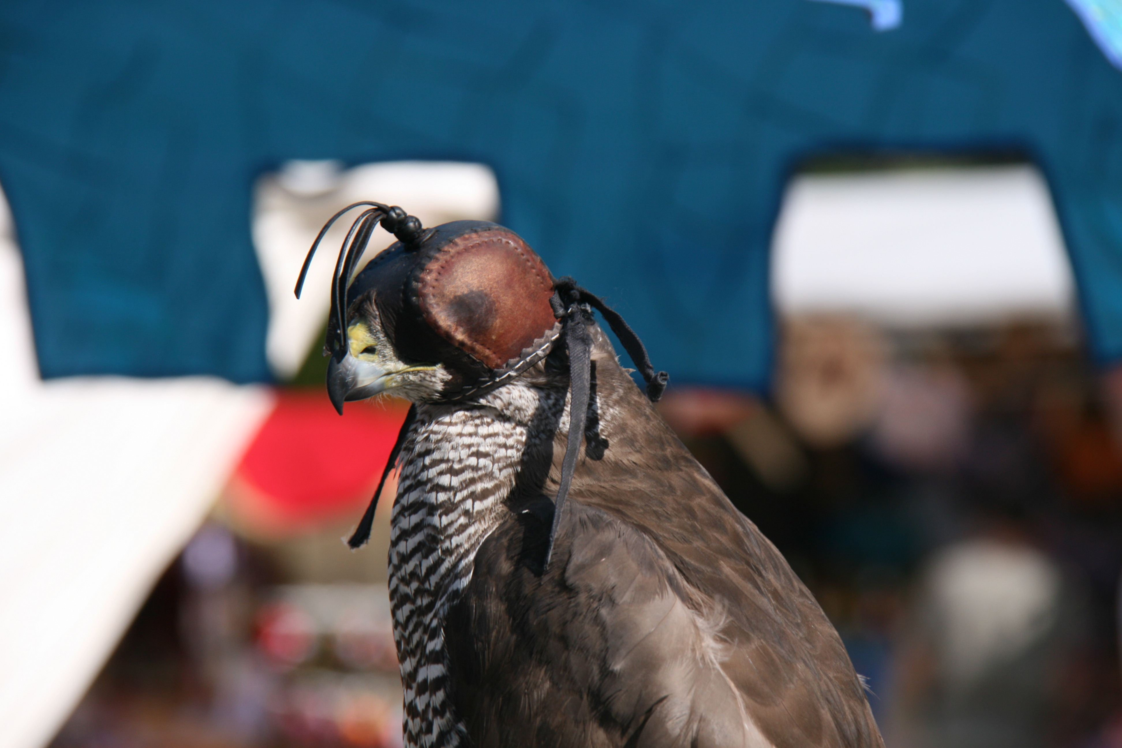 Halcón